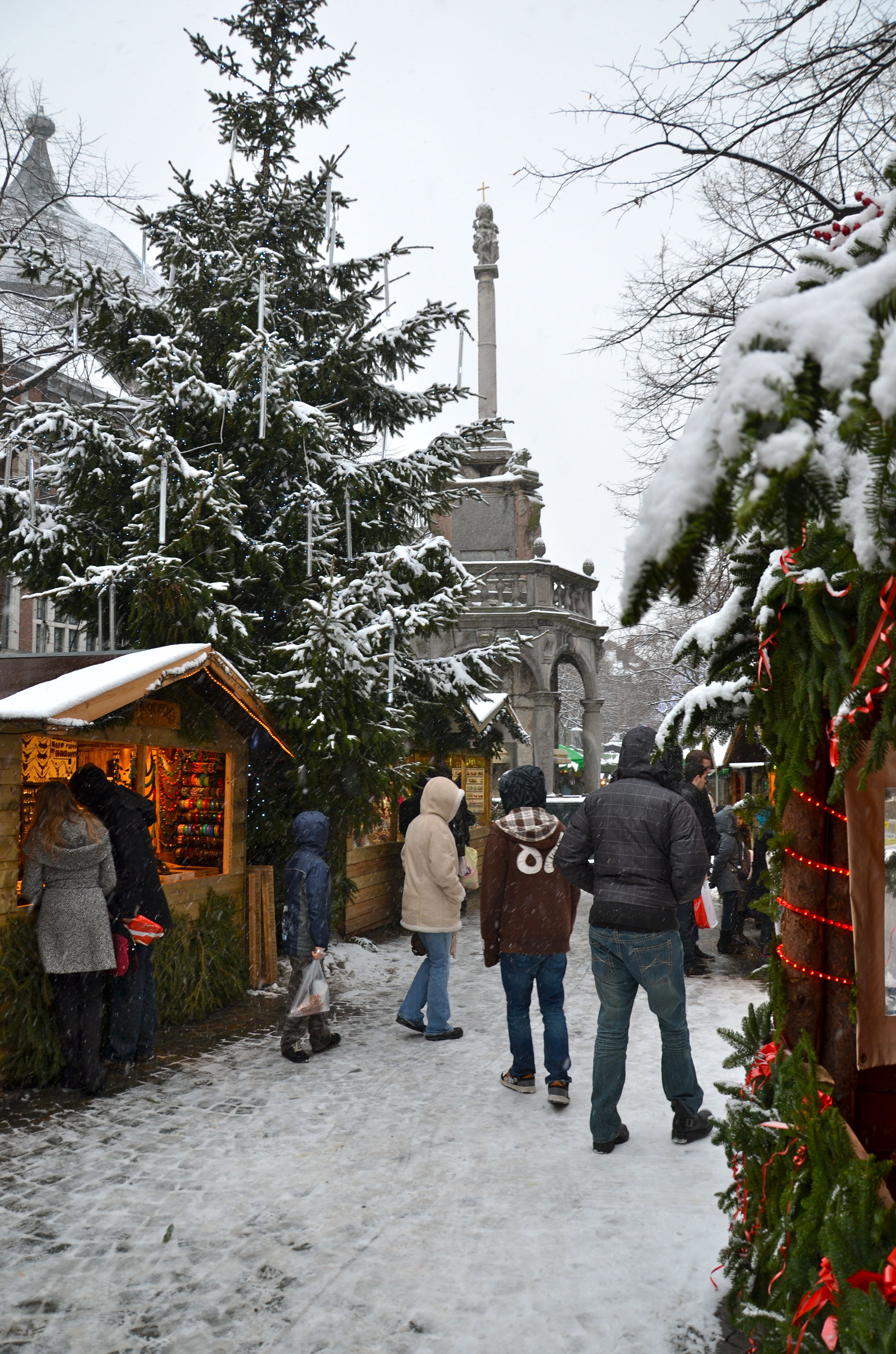 Perron et village de Noël